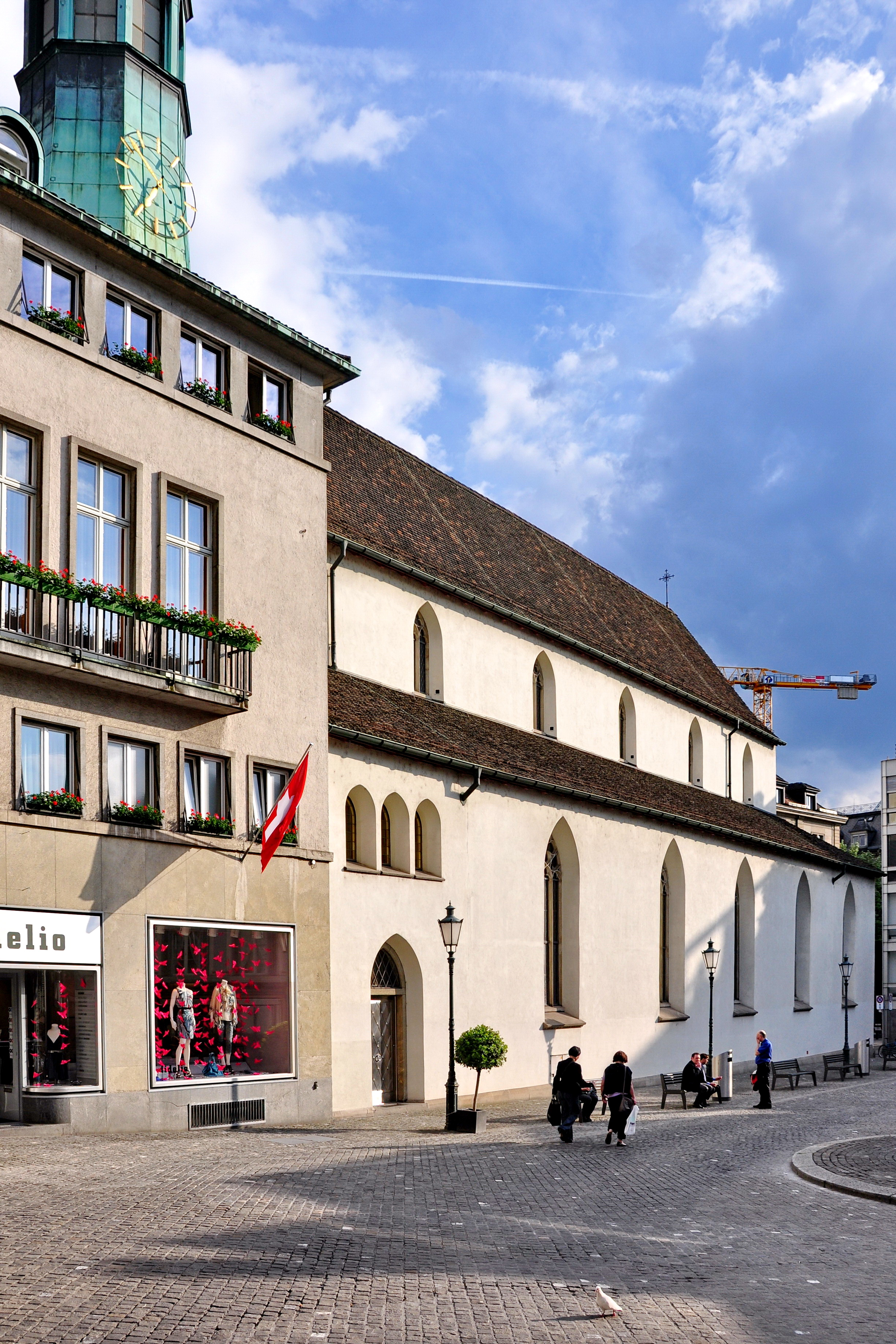 Augustinerkirche at Münzplatz in Lindenhof quarter in Zürich (Switzerland), as seen from Augustinergasse.